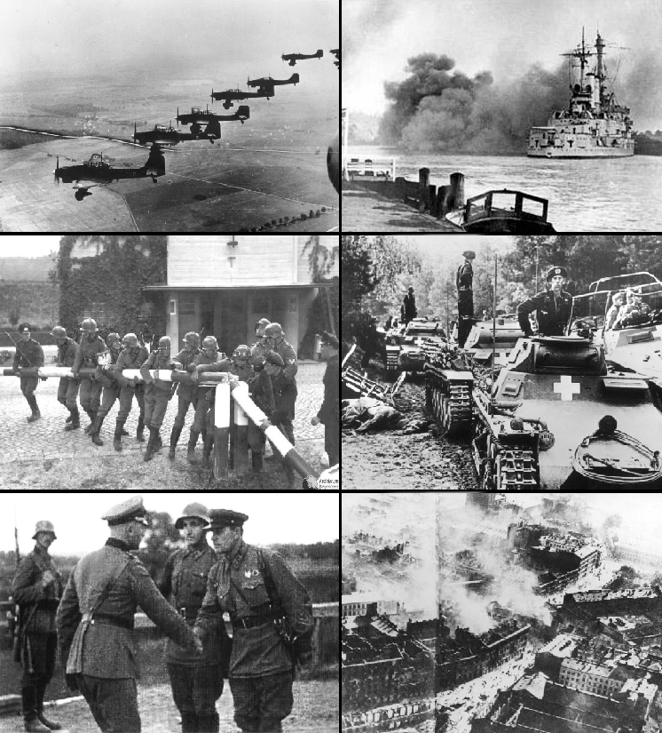 中文（台灣）: 公共領域之照片合集，分別為： File:Spotkanie Sojuszników.jpg File:Bundesarchiv Bild 146-1976-071-36, Polen, an der Brahe, deutsche Panzer.jpg File:Płonąca_oblężona_Warszawa.jpg File:Schleswig Holstein firing Gdynia 13.09.1939.jpg File:WWII Poland Invasion 1939-09-01a.jpg File:Bundesarchiv Bild 183-1987-1210-502, Polen, Stukas.jpg